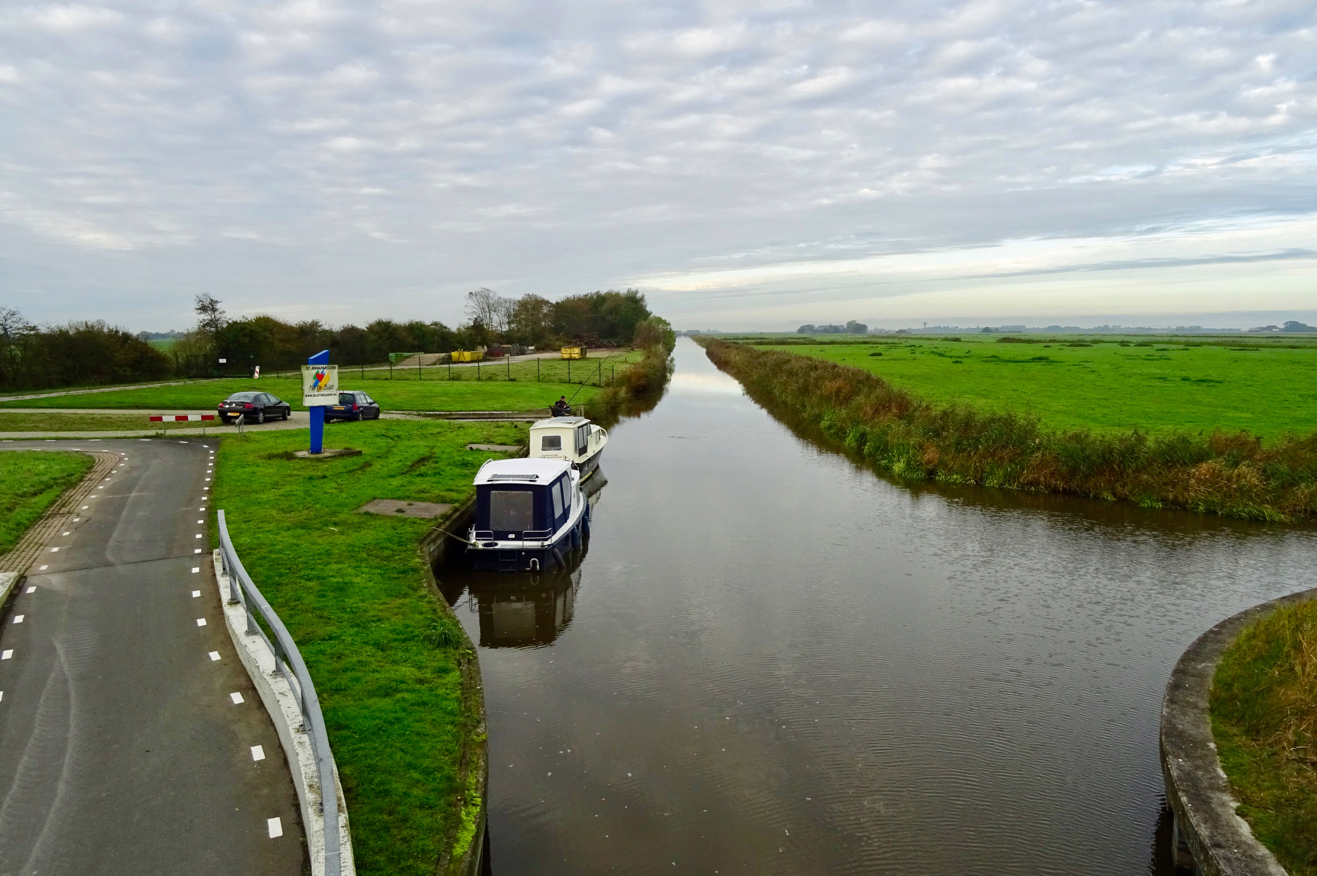 Kruising van de Blikvaart/Blikfeart (naar boven) met de Zuidervaart/Súdderfaart (naar rechts) en de Zuidhoekstervaart/Súdhoekster Feart (naar beneden) ten zuiden van Sint-Annaparochie